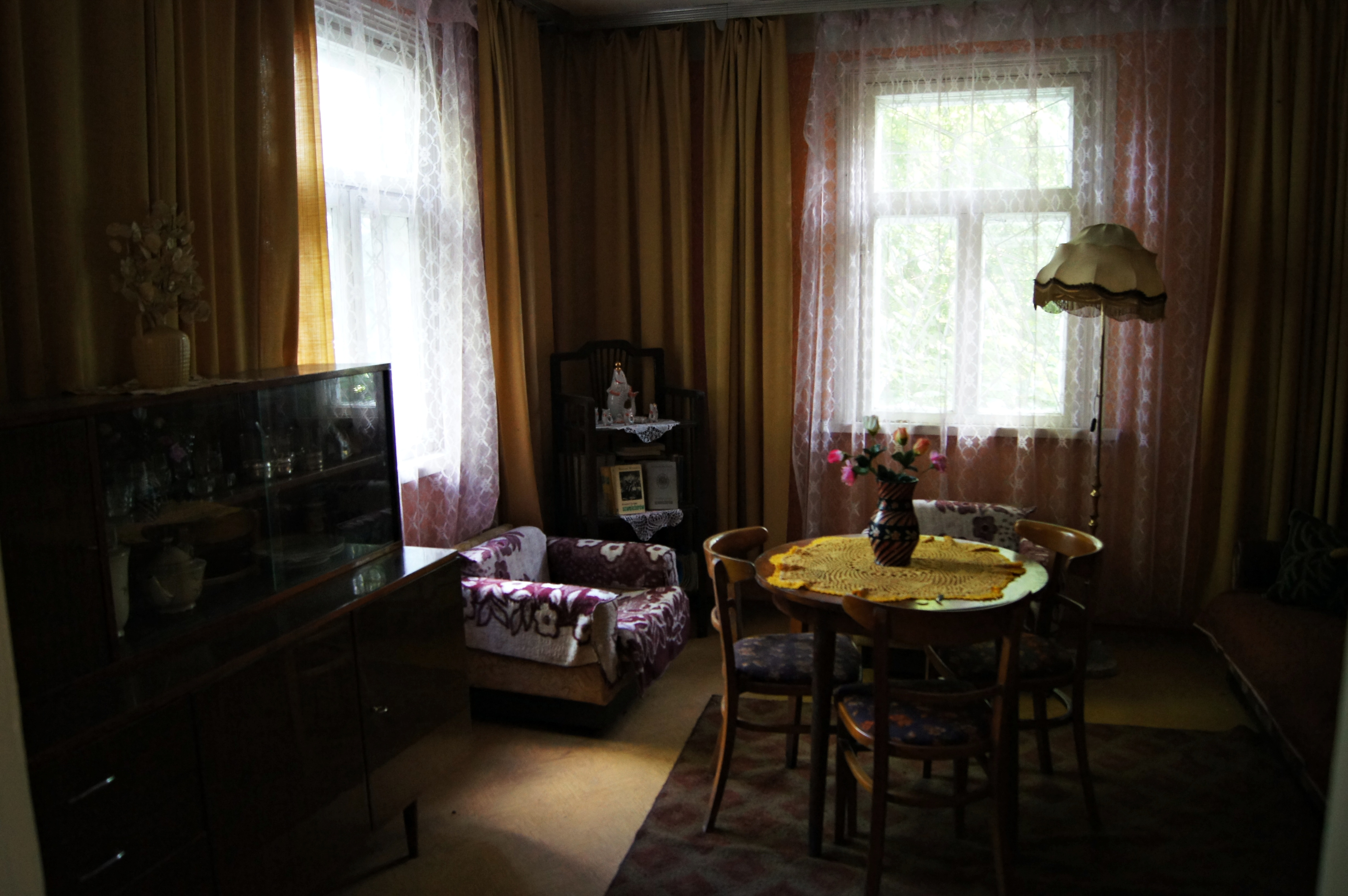 Dom Mariana Piekarskiego przy ulicy Podhorskiego 5 (dawniej Kolejowa 8/1) w Suwałkach.